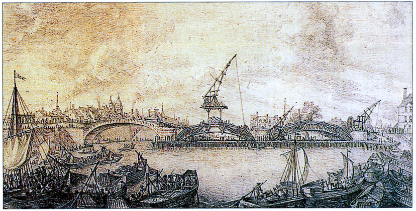 La construction du pont Royal sur la Loire à Orléans, 1755, par Aignan-Thomas Desfriges (1715-1800) et Chedel